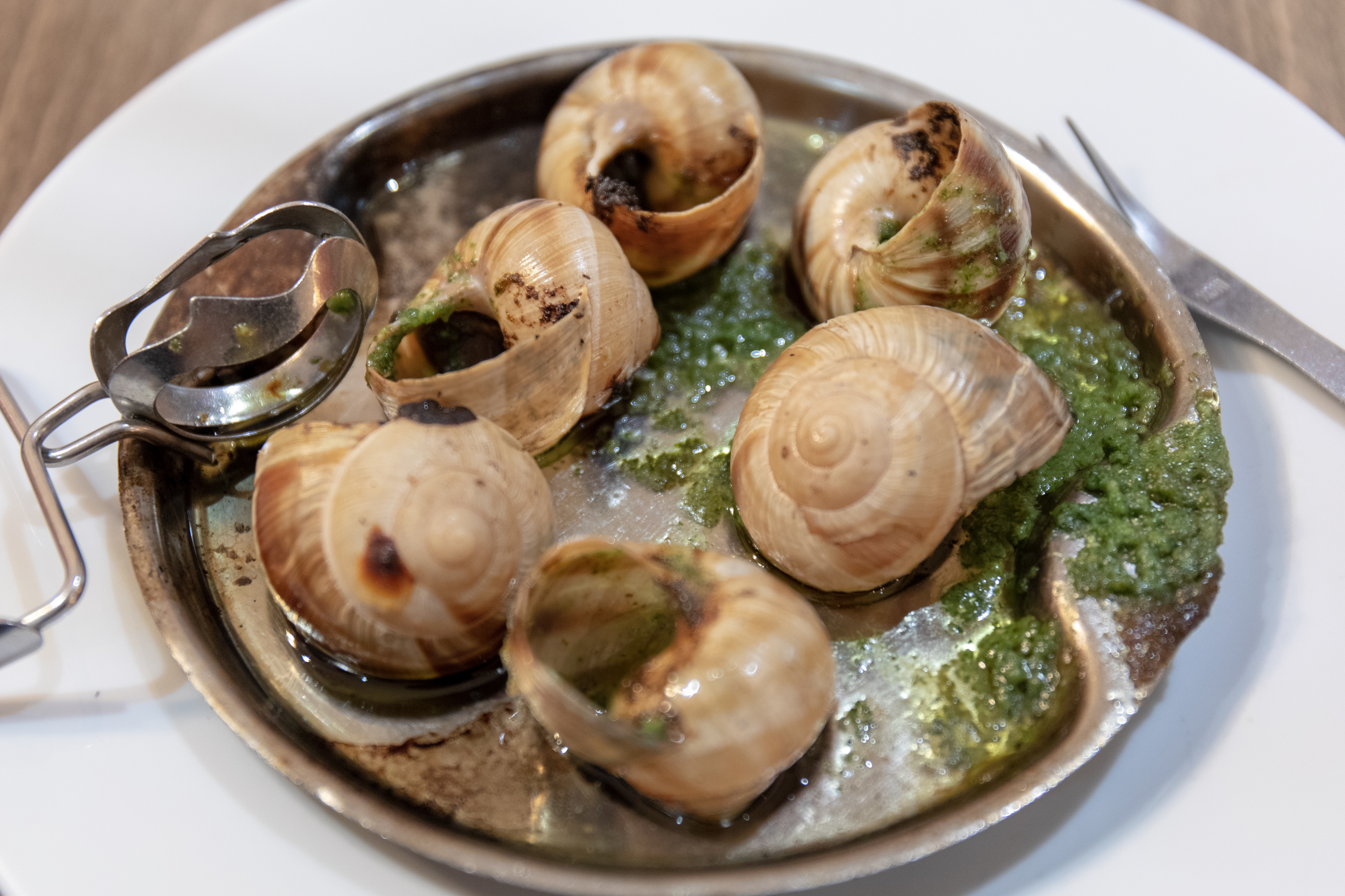 皿に盛り付けられたエスカルゴ。２０１８年にフランス パリで撮影。